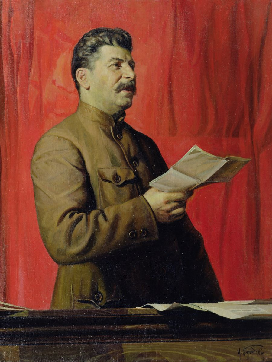 Stalin